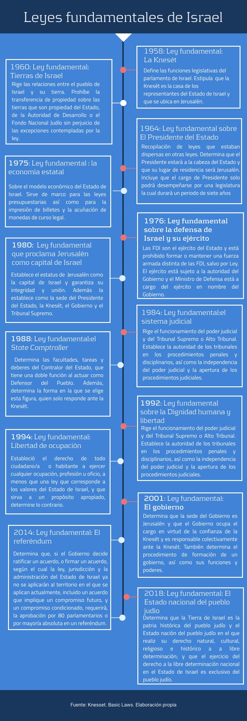 leyes básicas del estado de israel